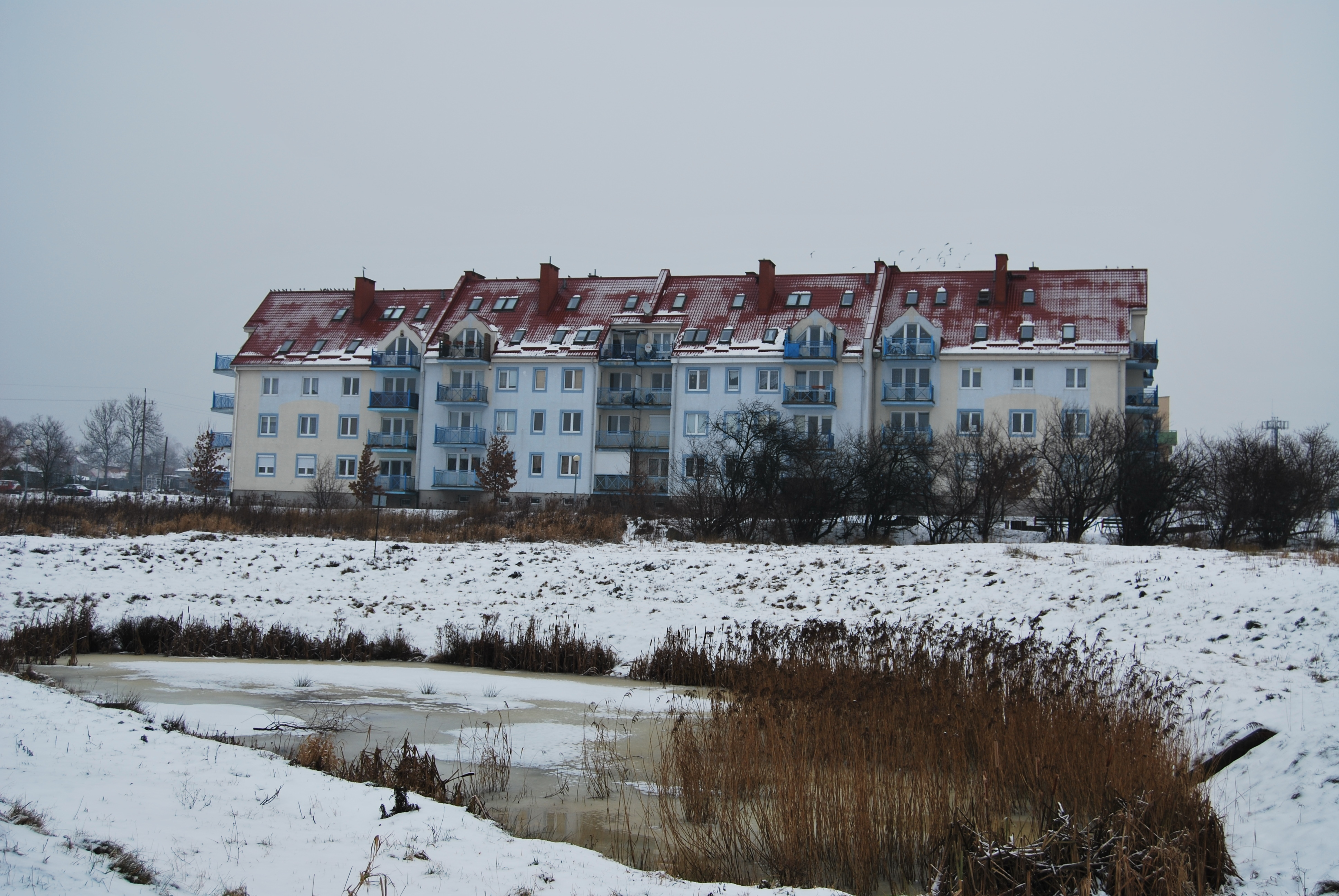 Gdańsk Ujeścisko ul. Przemyska 43. Grudzień 2009 r.